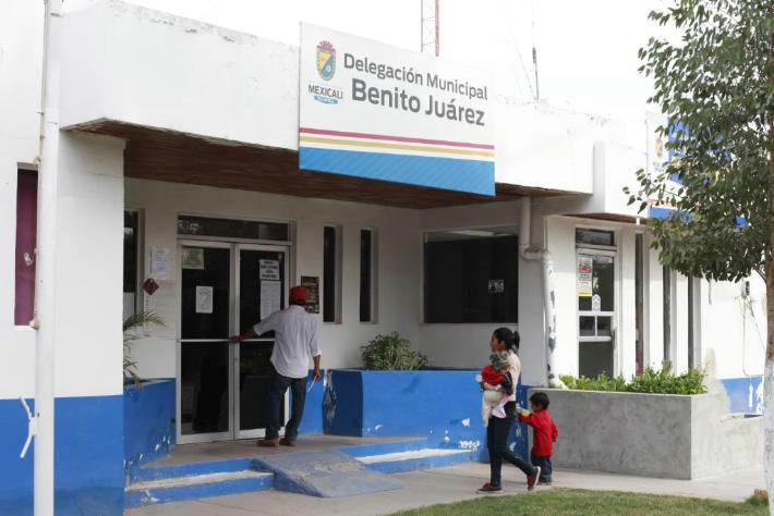 En el Poblado Benito Juarez (Tecolotes)